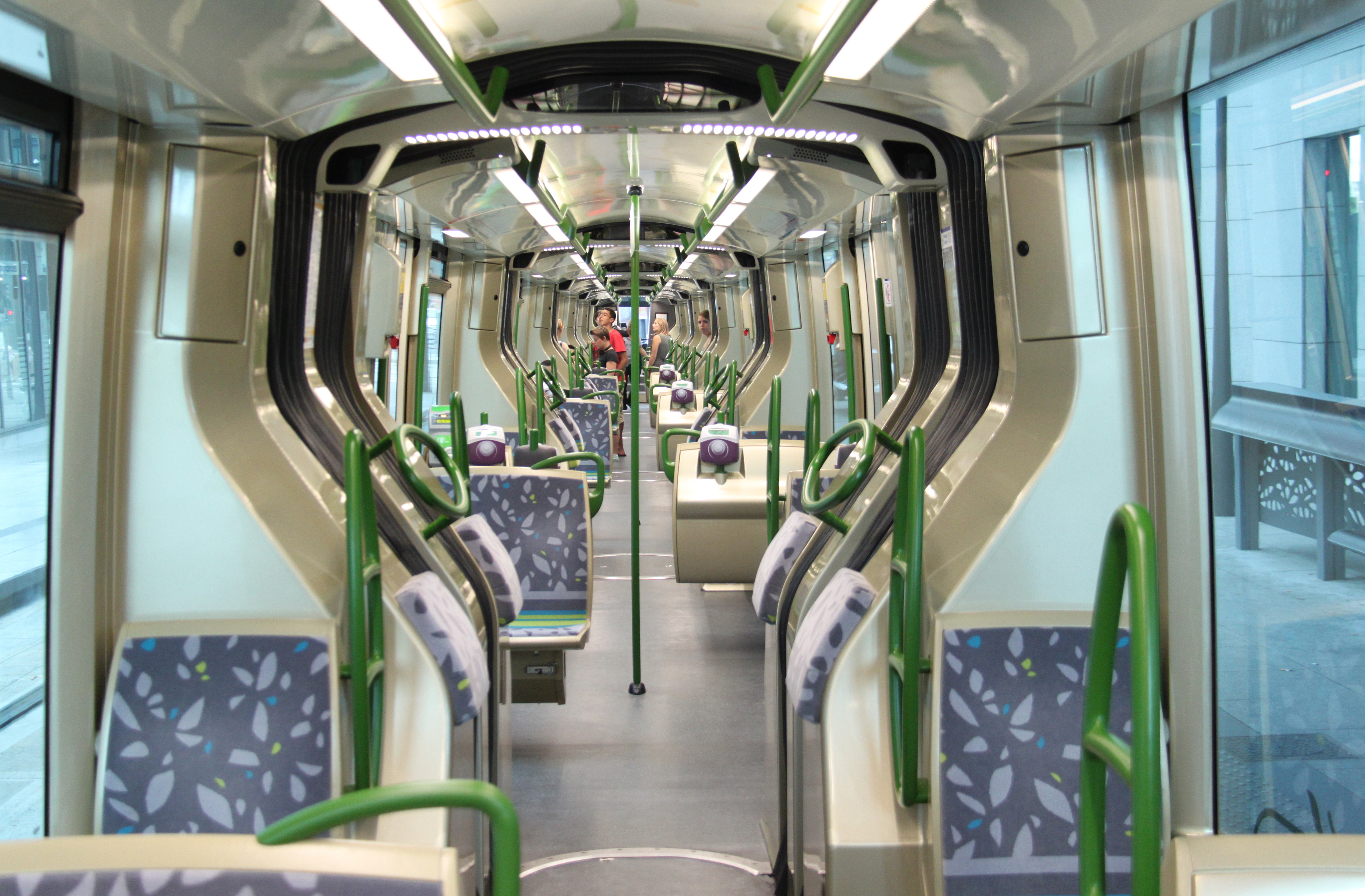 Interieur van een STE6-voertuig Translohr van tramlijn 6 van de RATP.